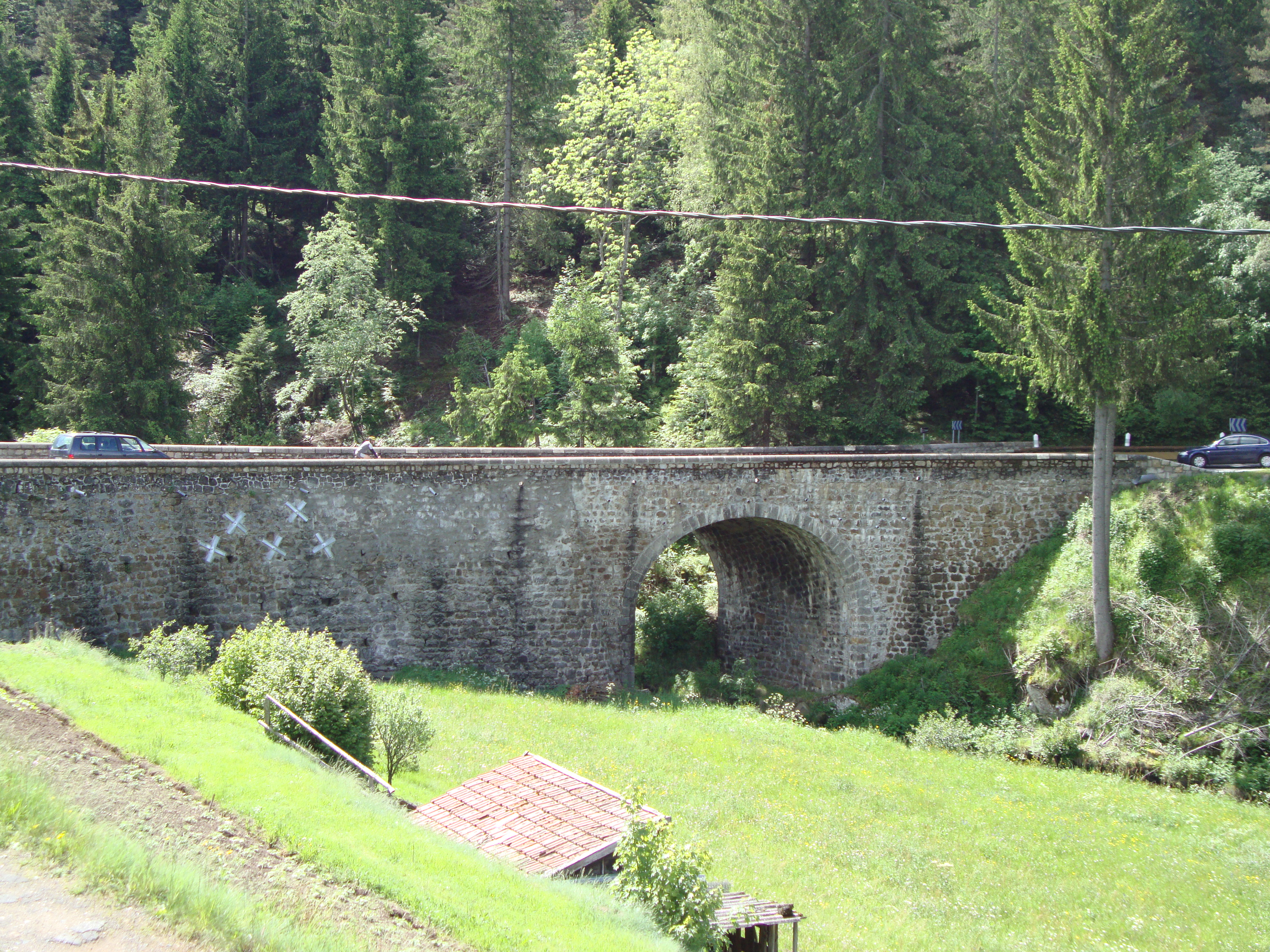 St.Agrève (Ardêche, Fr) Pont sur l'Eyrieux